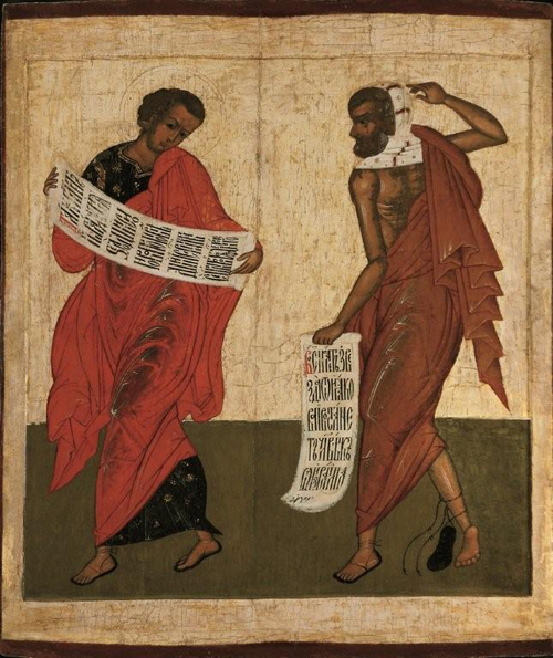 Пророк Захария и волхв Валаам. XVII век. Из церкви Успения с Парома. Икона Пророческого ряда. Изображение пророка Захарии и волхва Валаама в рост с развернутыми свитками в руках. Инв. № 1638. Псковский государственный объединенный историко-архитектурный и художественный музей-заповедник